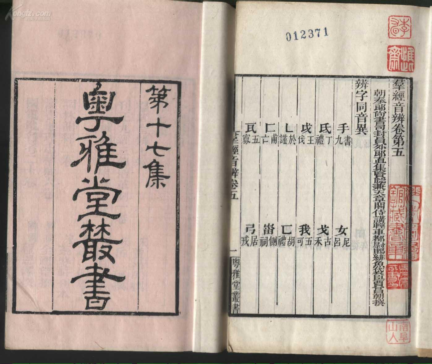 粵語: 粵雅堂叢書